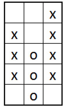 Einfaches Kaufsignal eines Point- und Figure-Chart